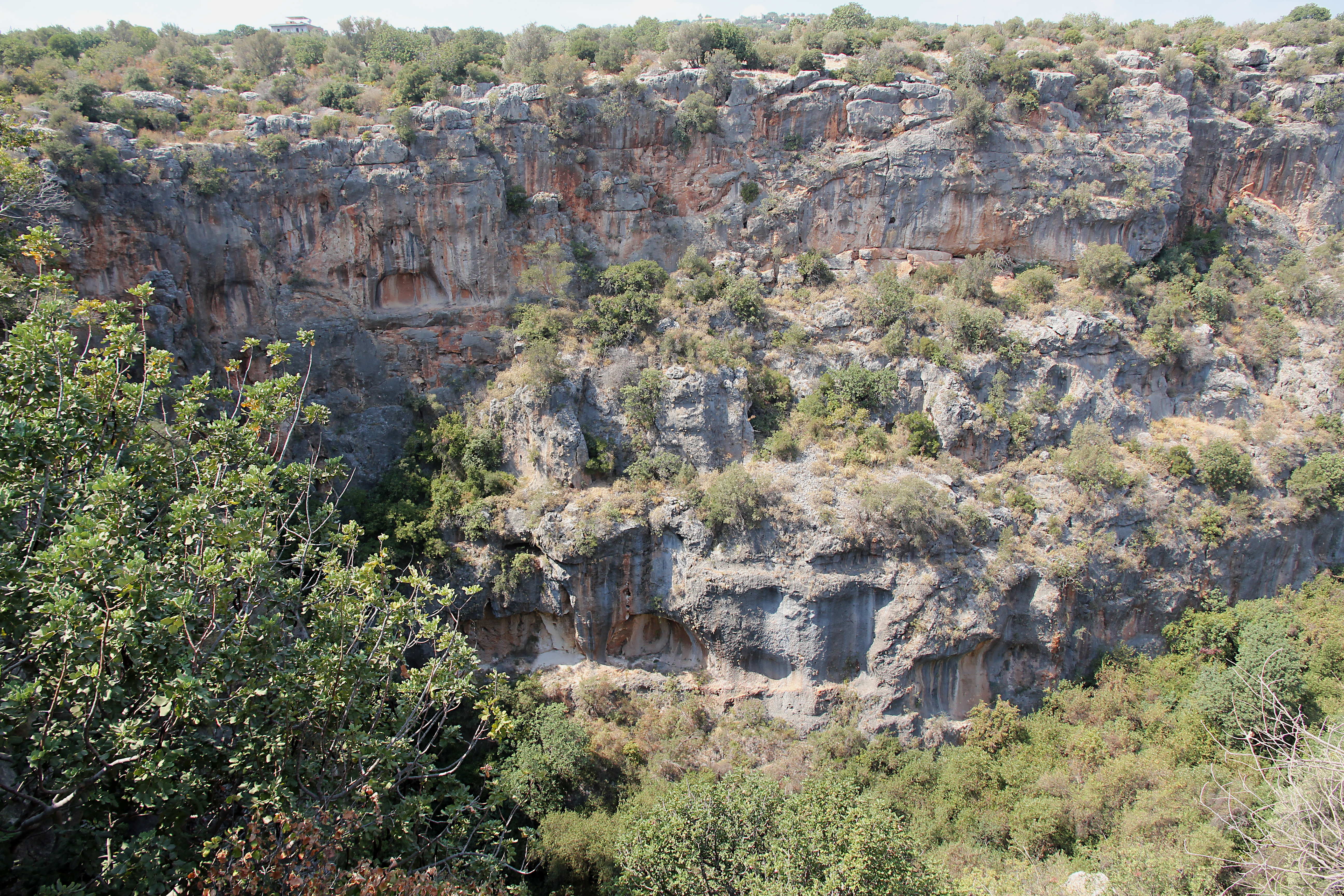 Cennet, eine der Korykischen Grotten (Cennet ve Cehennem), Doline bei Silifke, Südtürkei